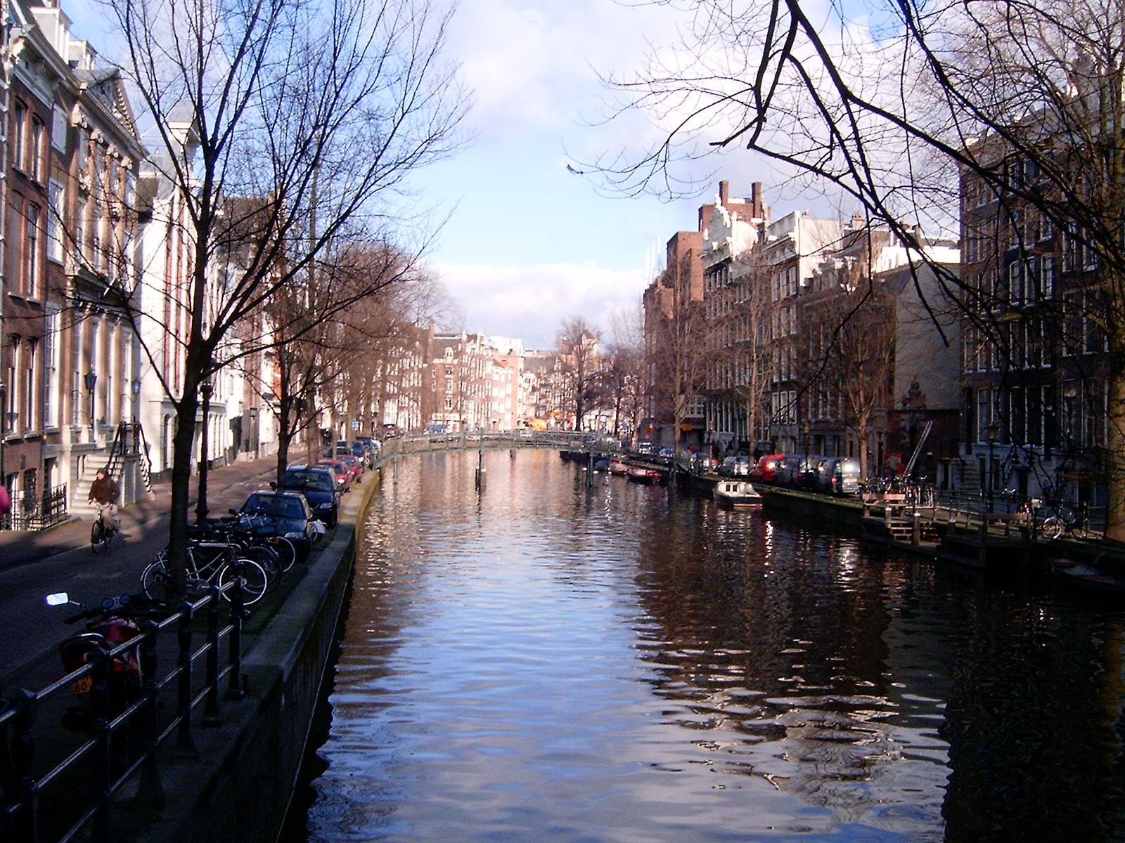 Amsterdam cannel